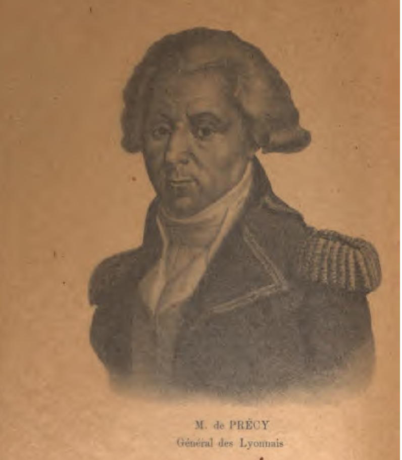 Portrait du Général de Précy, lithographie Chometon publiée en 1821